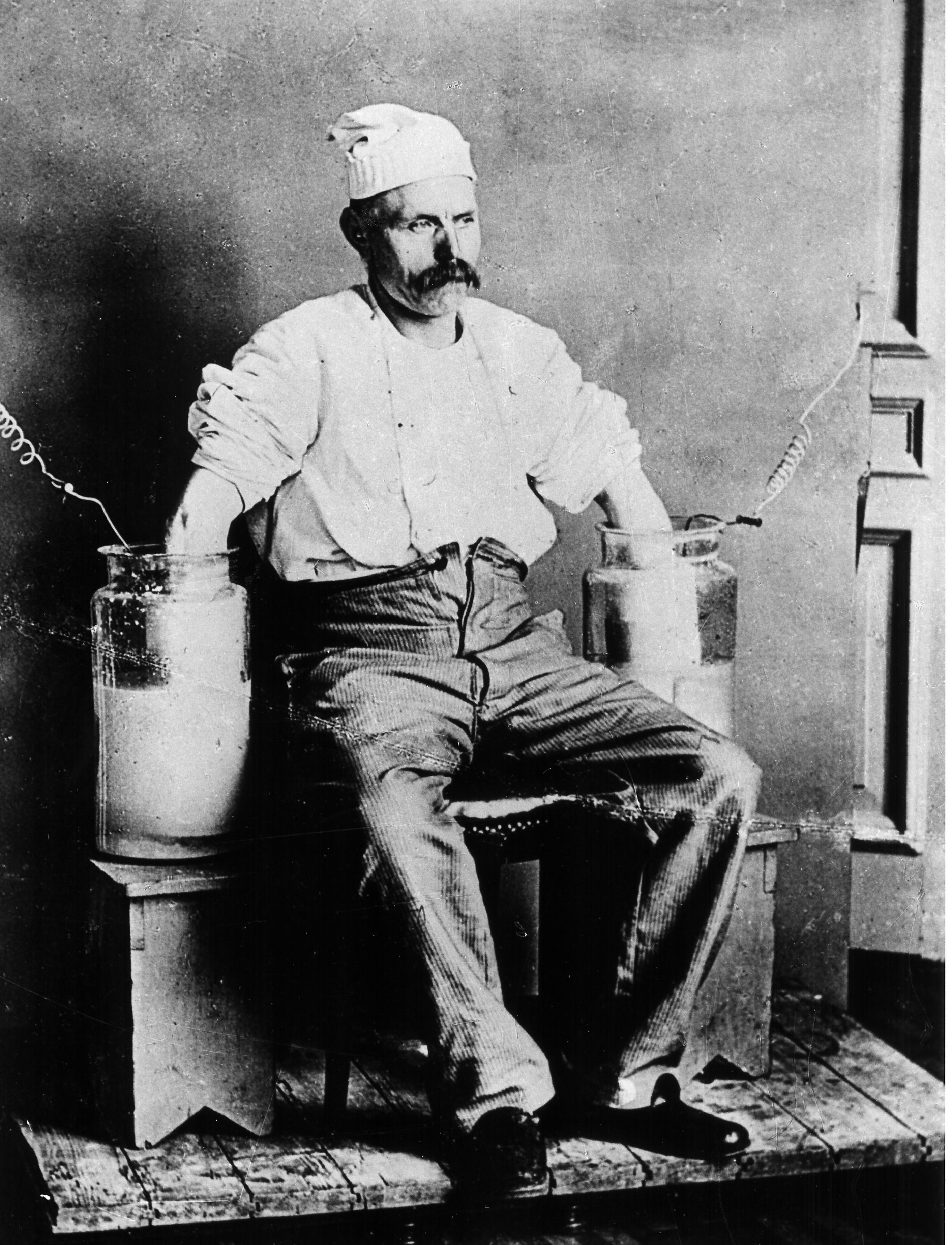 Einthoven ECG2